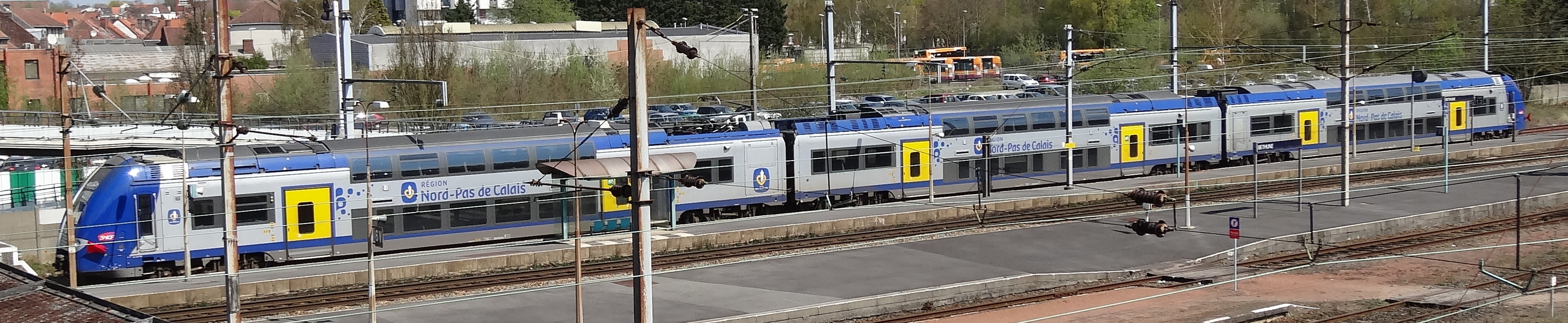 Gare de Béthune, Pas-de-Calais, Nord-Pas-de-Calais, France.